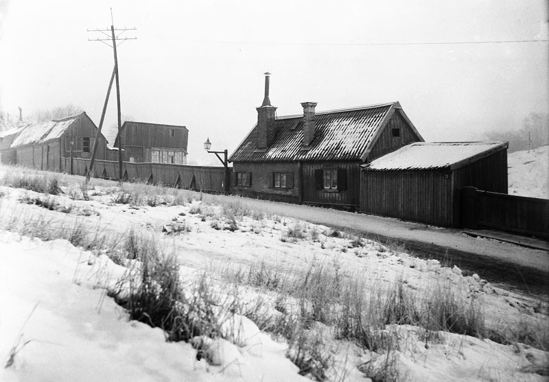 Sköldgatan 9-11 i östra delen av Tantolunden. Nuvarande Ekermans Gränd, kv. Ekermanska Gården